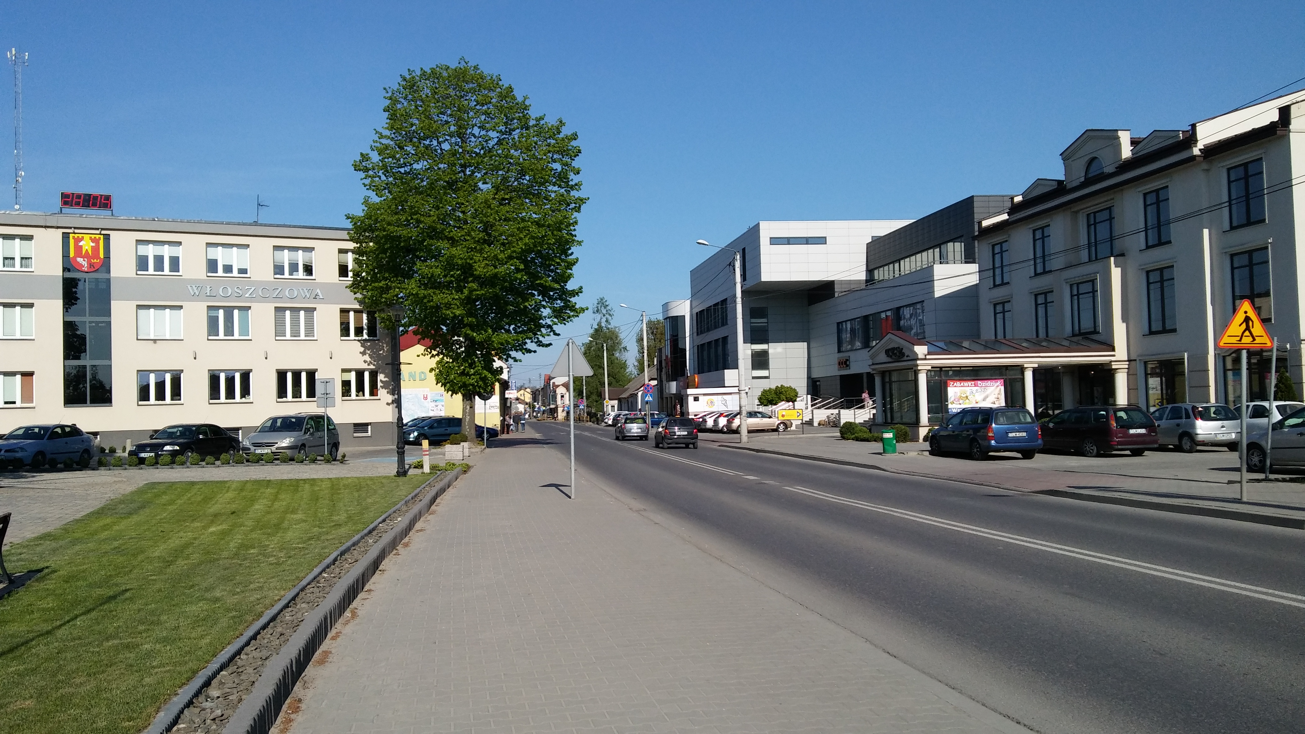 Ul. Partyzantów we Włoszczowie.